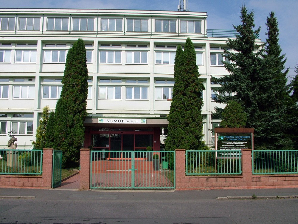 Výzkumný ústav meliorací a ochrany půdy, pohled na budovu